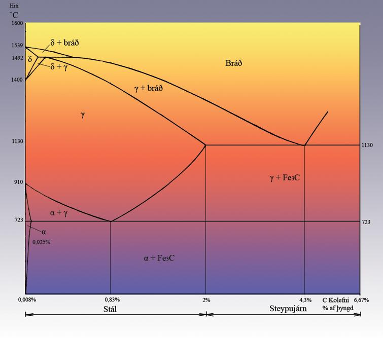 Teiknuð litmynd af Járn- kolefnislínuritinu.